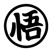 Logotipo "Go" (Sabiduría) de Goku del manga Dragon Ball.